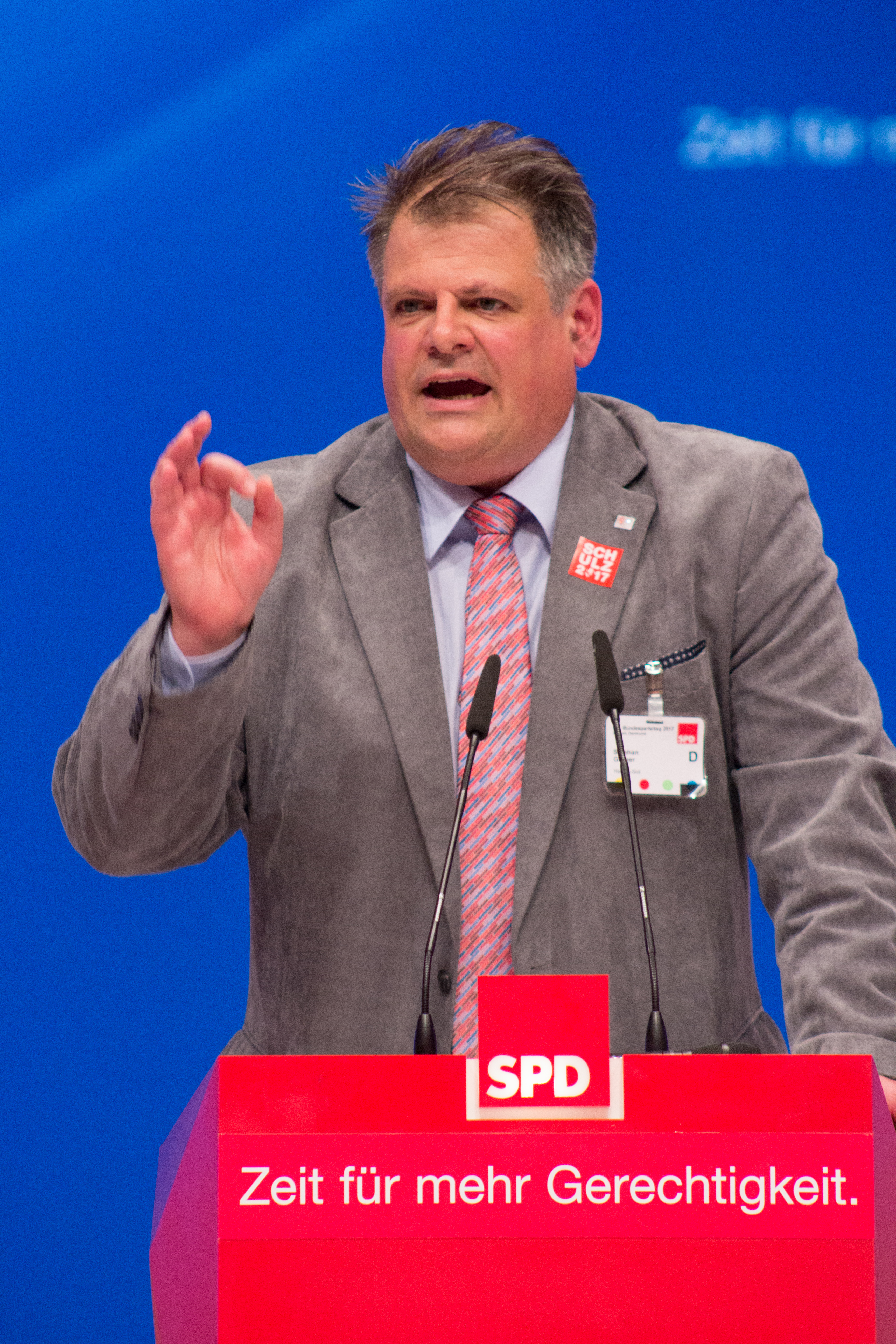 tephan Grüger auf dem SPD Bundesparteitag am 25. Juni 2017 in Dortmund